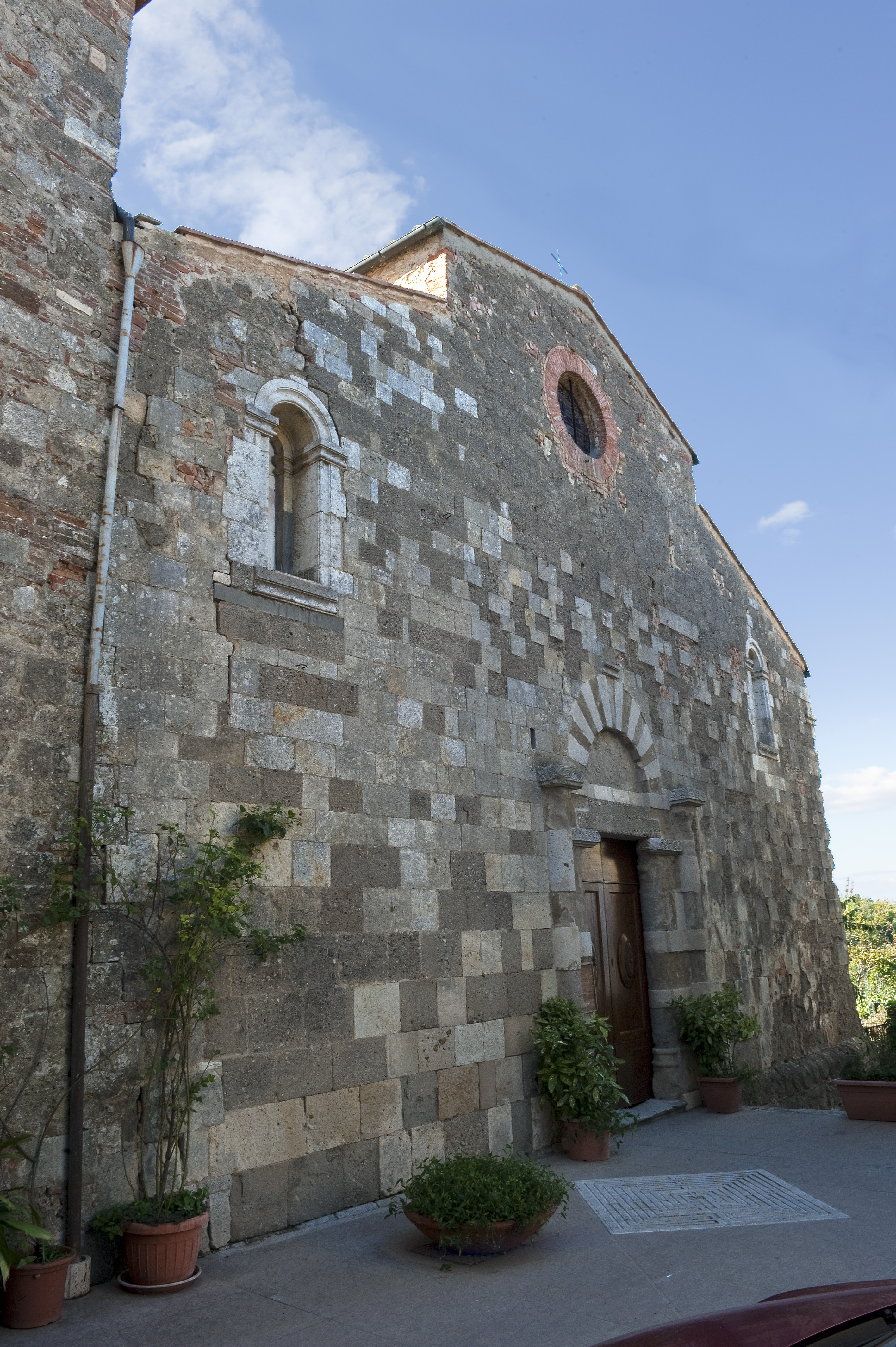 Facciata della pieve di San Giovanni Battista a Mensano (Casole d'elsa)